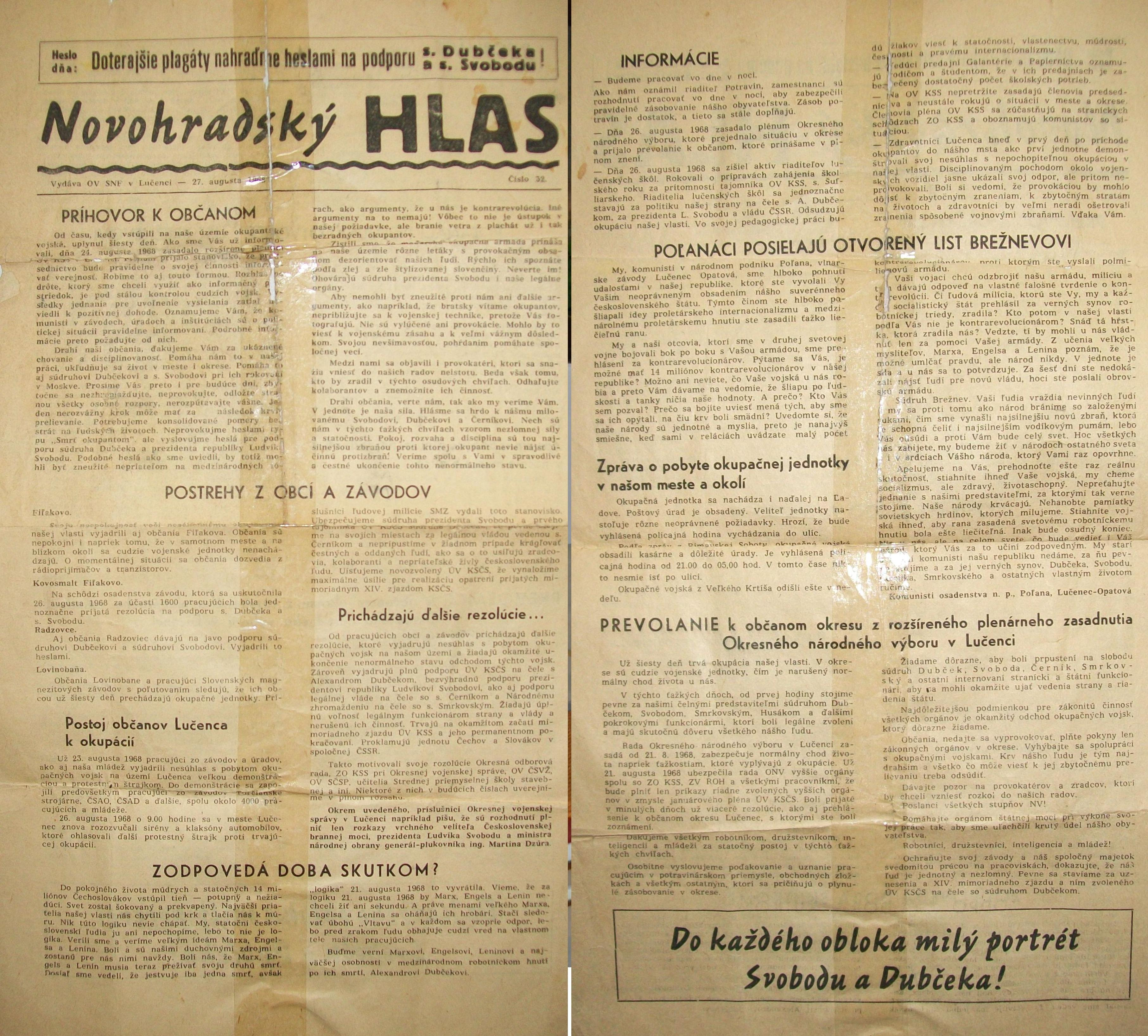 Leták kritizujúci vpád vojsk Varšavskej zmluvy do Česko-Slovenska zhodený z lietadla v auguste 1968 v Lučenci.